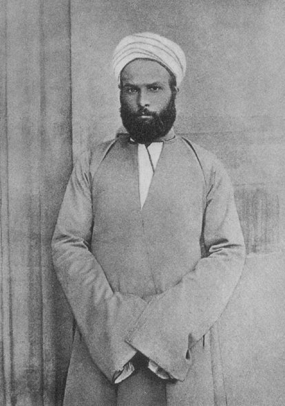 Mohammed Abduh (1849-1905), Egyptian Mufti and Islamic reformer ar: الشيخ محمد عبده - مصلح ومجدد إسلامي وأول مفتي للديار المصرية